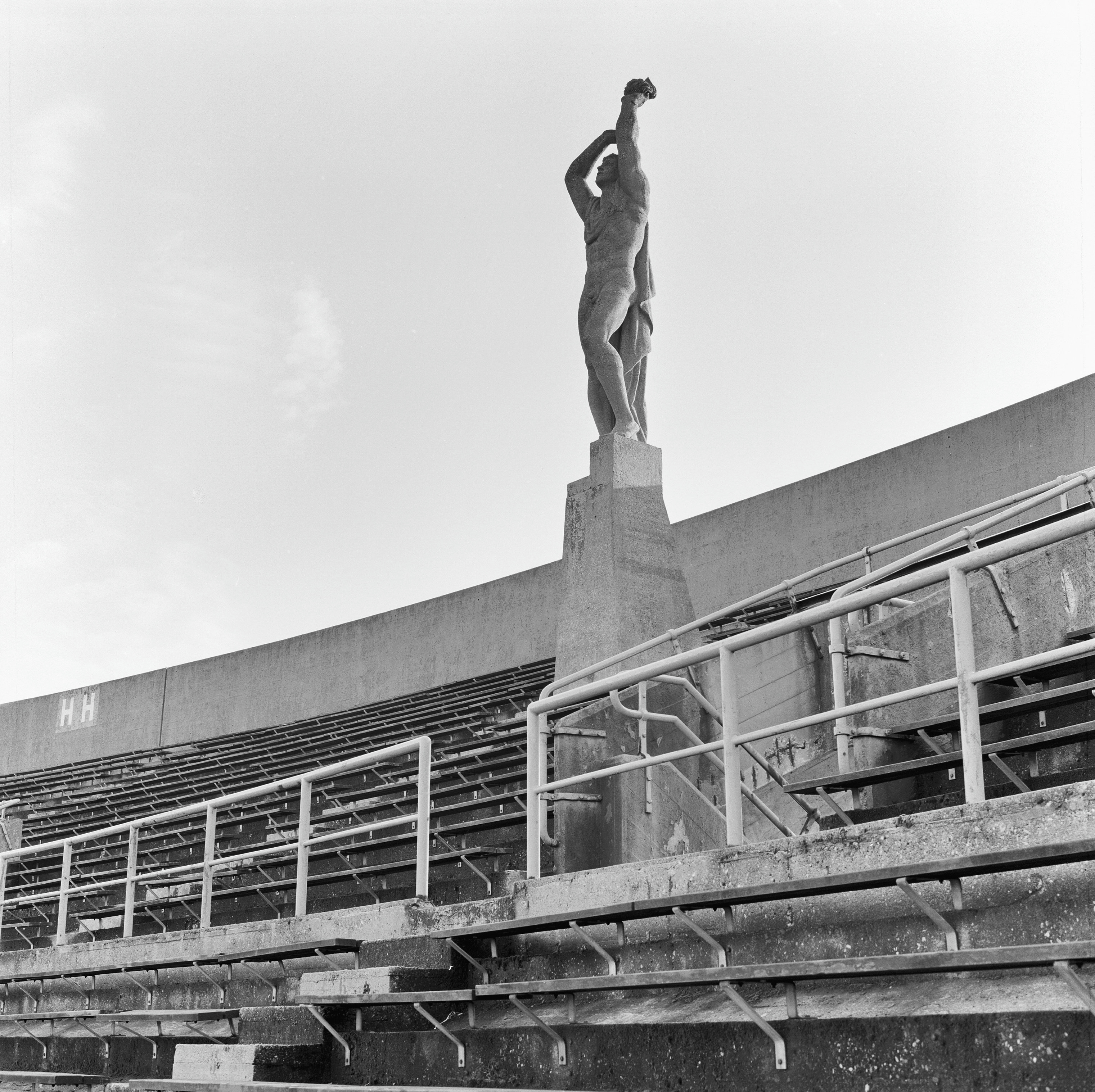 OLYMPISCH STADION: Exterieur HERDENKING-MONUMENT (WO II, GESNEUVELDE SPORTLIEDEN)